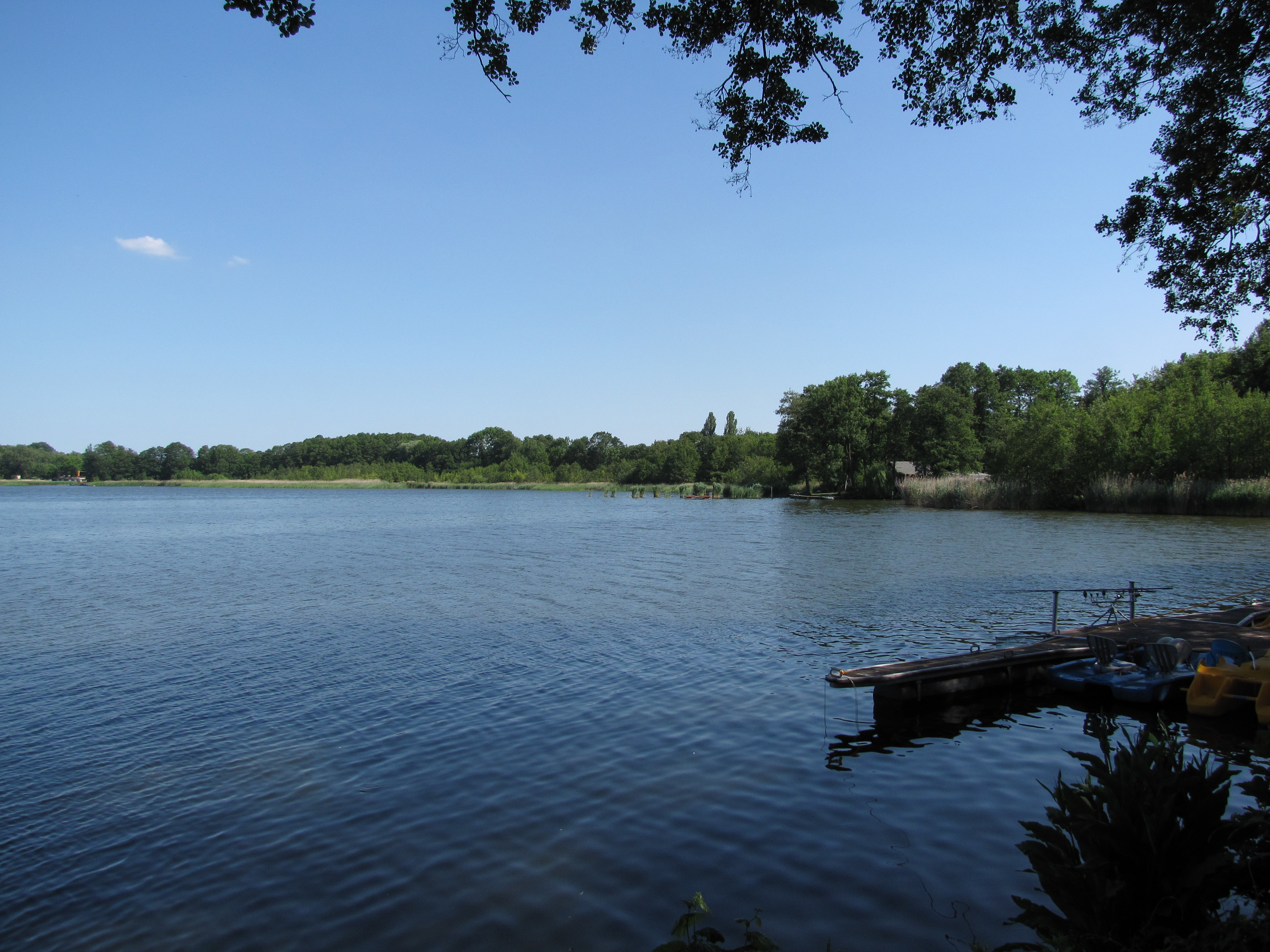 Blick von den Mellenseeterrassen auf den Mellensee, Ortsteil Klausdorf, Gem. Am Mellensee, Brandenburg, Deutschland